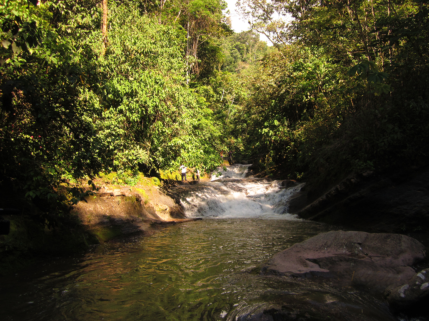 Río Huaynabe